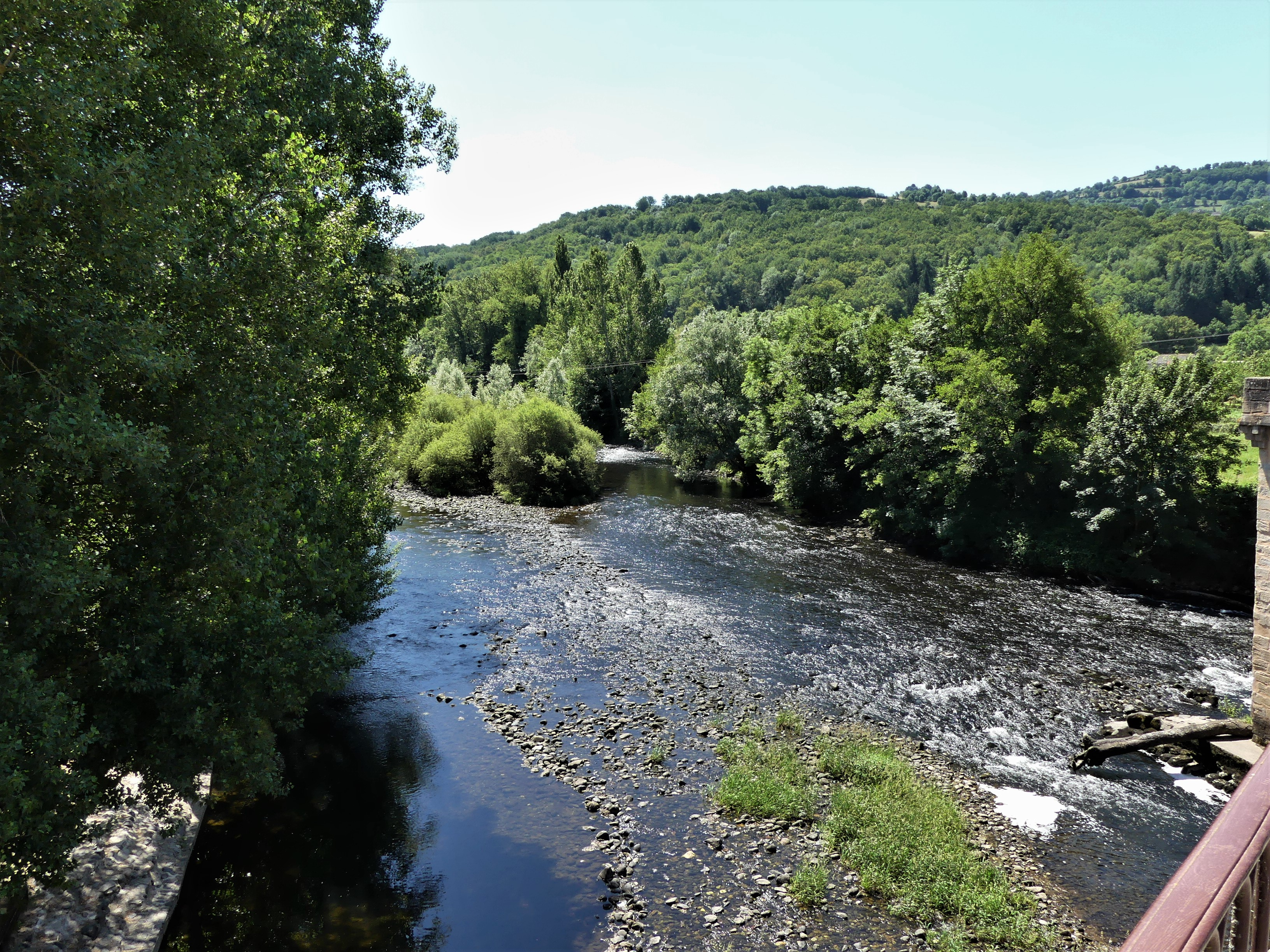 Le Lot en amont du vieux pont, Saint-Côme-d'Olt, Aveyron, France.